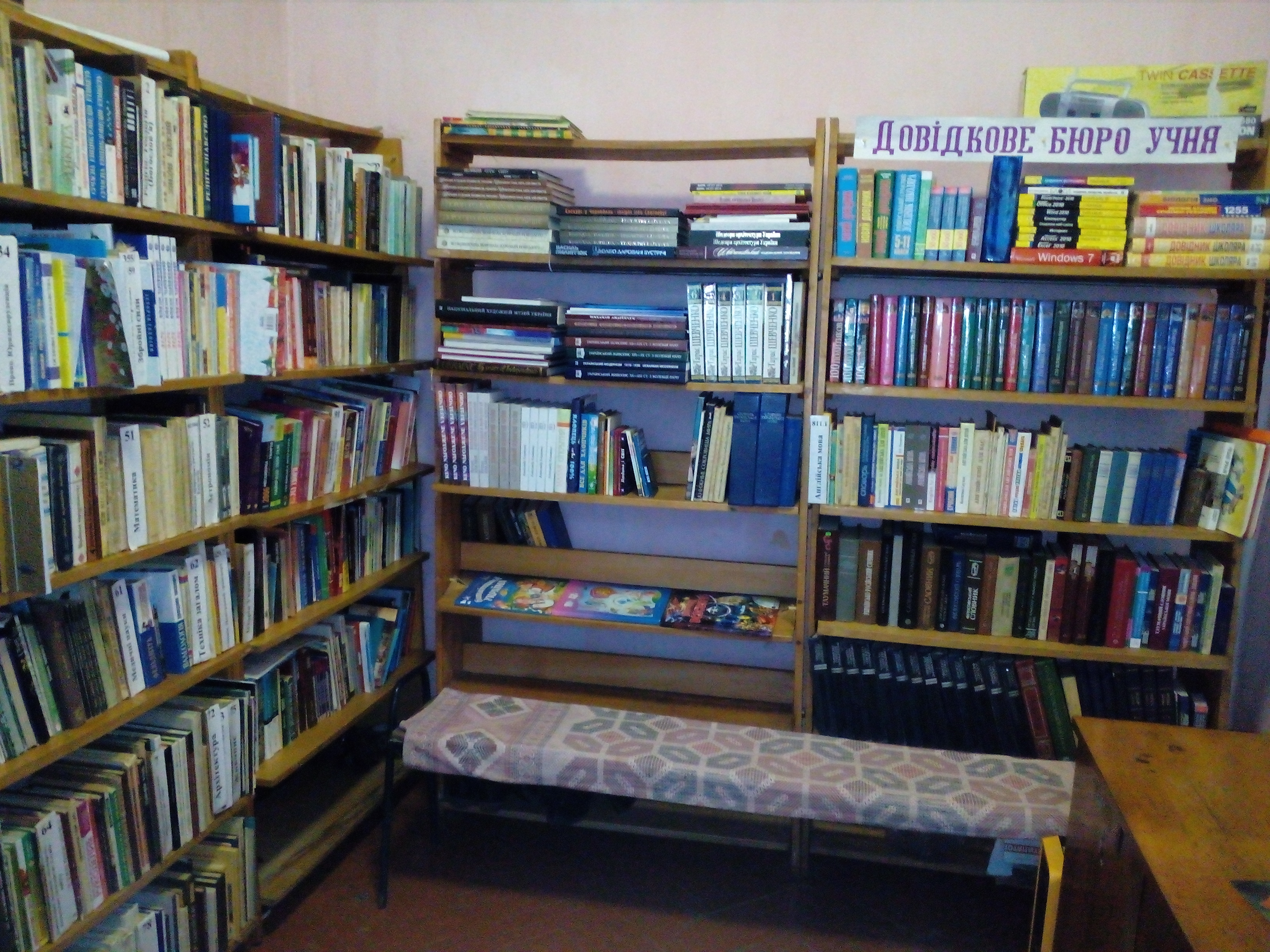 Книгосховище для різної вікової категорії читачів бібліотеки-філії №14 Хмельницької міської ЦБС.